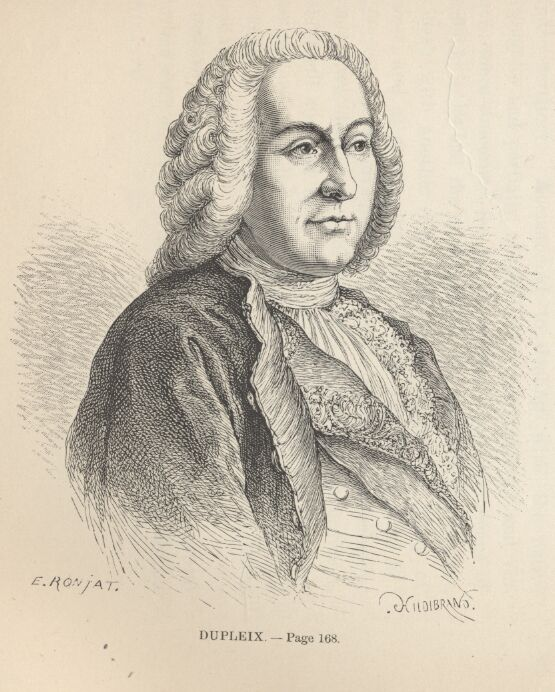 Portrait de Joseph Dupleix